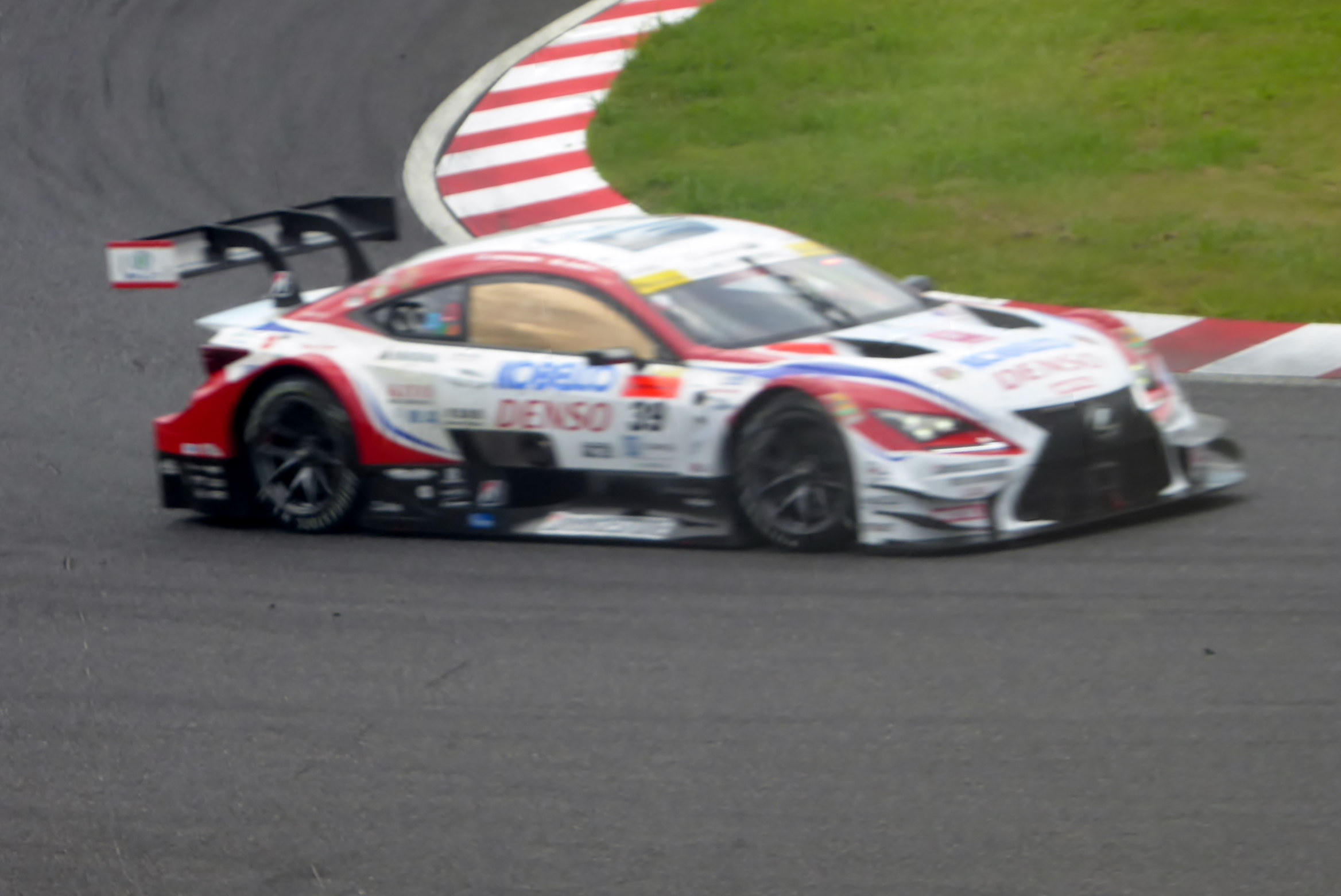 2016年鈴鹿1000㎞における39号車DENSO KOBELCO SARD RC Fを撮影。